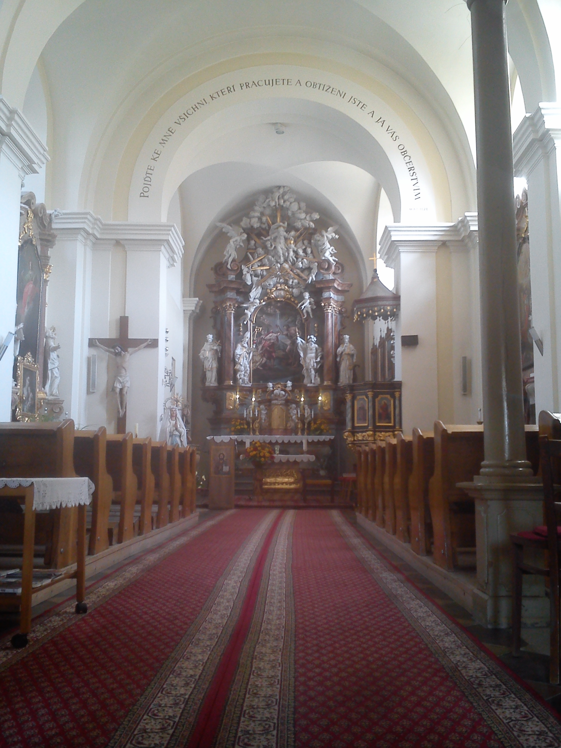 Interiér kostela sv. Jana Křtitele v Boleradicích